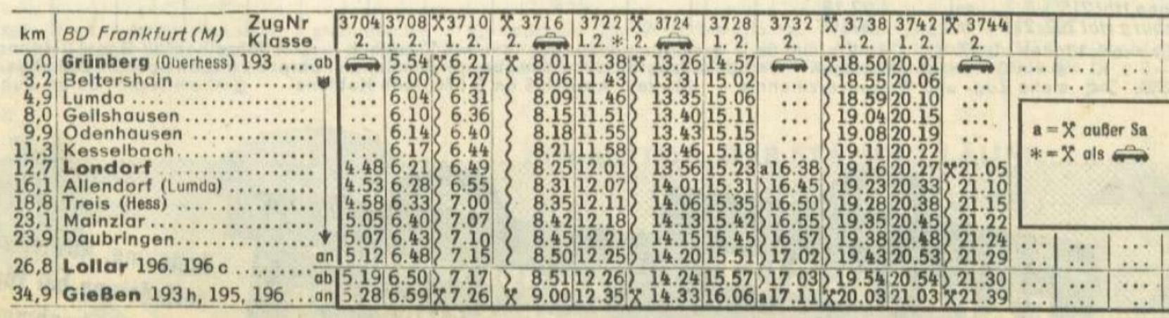 Kursbuchauszug Sommerfahrplan Lumdatalbahn